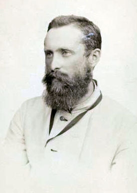 Бронислав Осипович Пилсудский. Фотоателье Кокити Ида, г. Хакодате